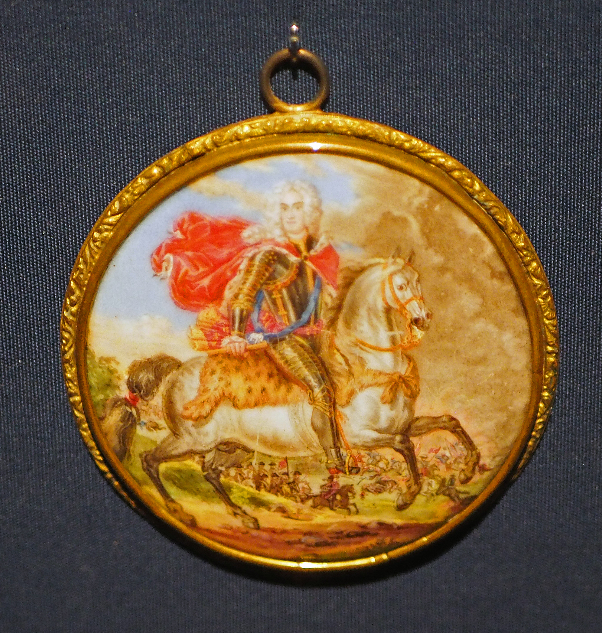 Painting, miniature; Miniatures